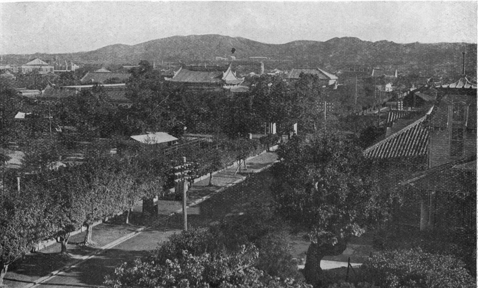 中文（台灣）: 新北州新竹市的東方附近橫列著的十八尖山，因成形於平原中，其海拔不超過130公尺。山頂上有一個大型觀景台，面對著仰望東南以次高山為中心綿延不絕、聳立雲端的高山，宛如西洋畫那般被田園自然環繞著的新竹市，甚至還能獨佔碧波萬頃的台灣海峽，而在東北蜿蜒盡頭的桃園高原則有著建於山中的中學及水源地的碧潭，可說是海陸風景兼具、著實雄偉的景觀。